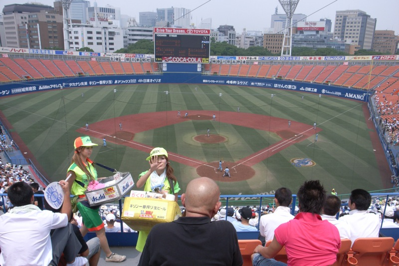 横浜スタジアム 売り子さんの脚力はすごい。上から下までくまなく回る。